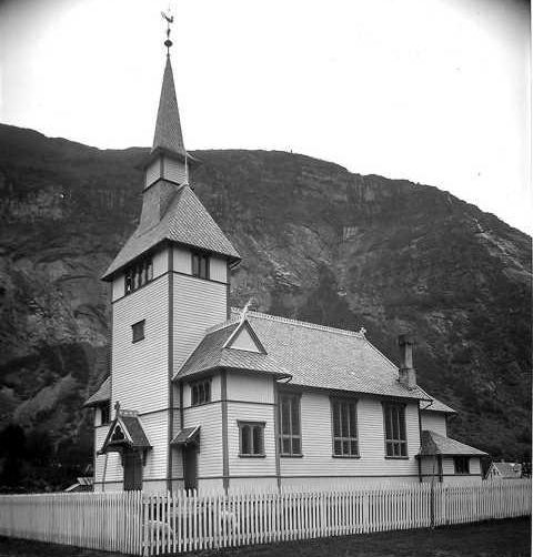 Gaupne kyrkje